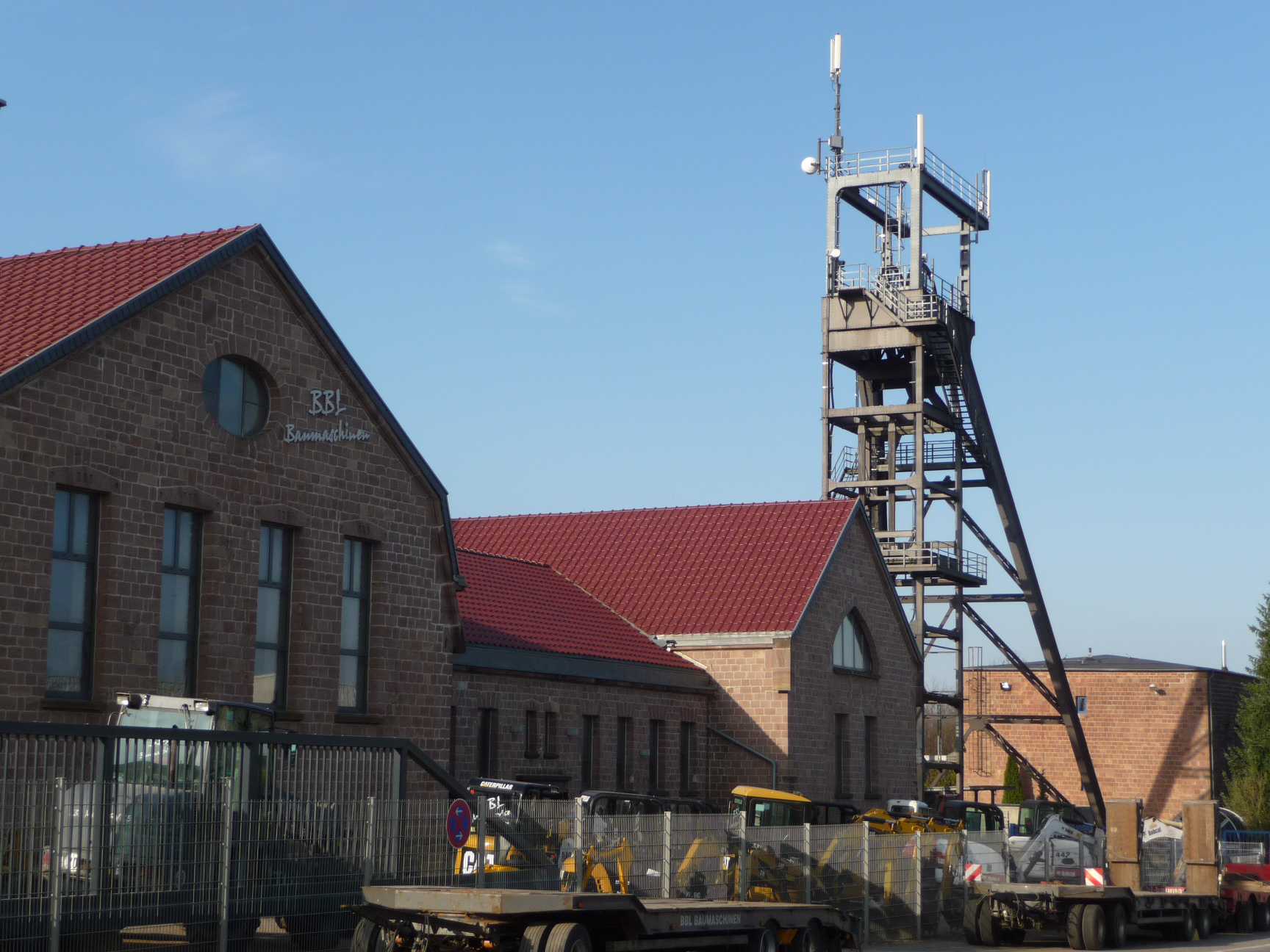 Schachtgerüst des Schachtes Holz der Grube Göttelborn